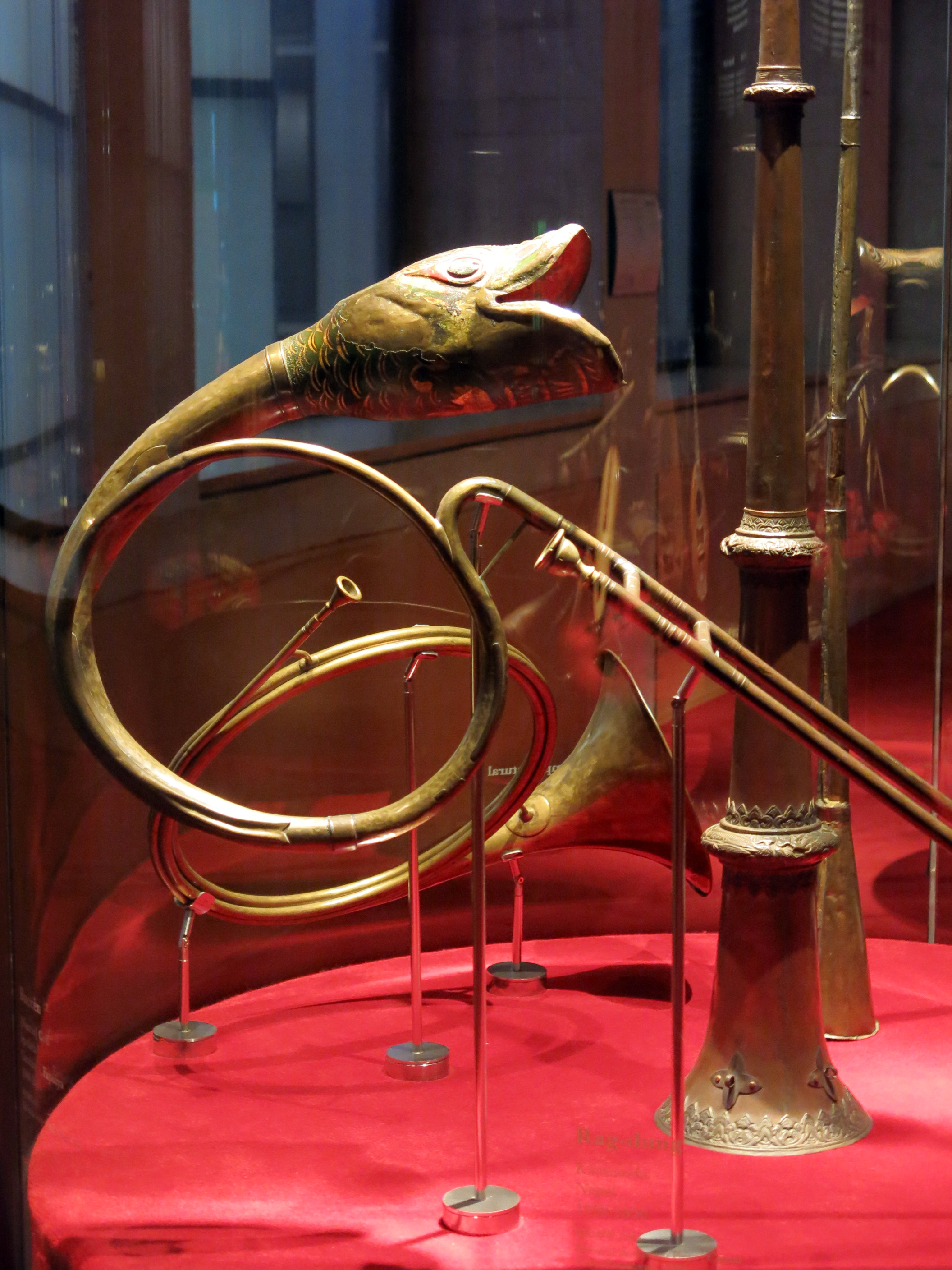 buccèn, de l'autor Narcís Coll (actiu a Igualada el 1788, segons els qüestionaris de Francisco de Zamora),Igualada, primera meitat segle XIX, MDMB 536.